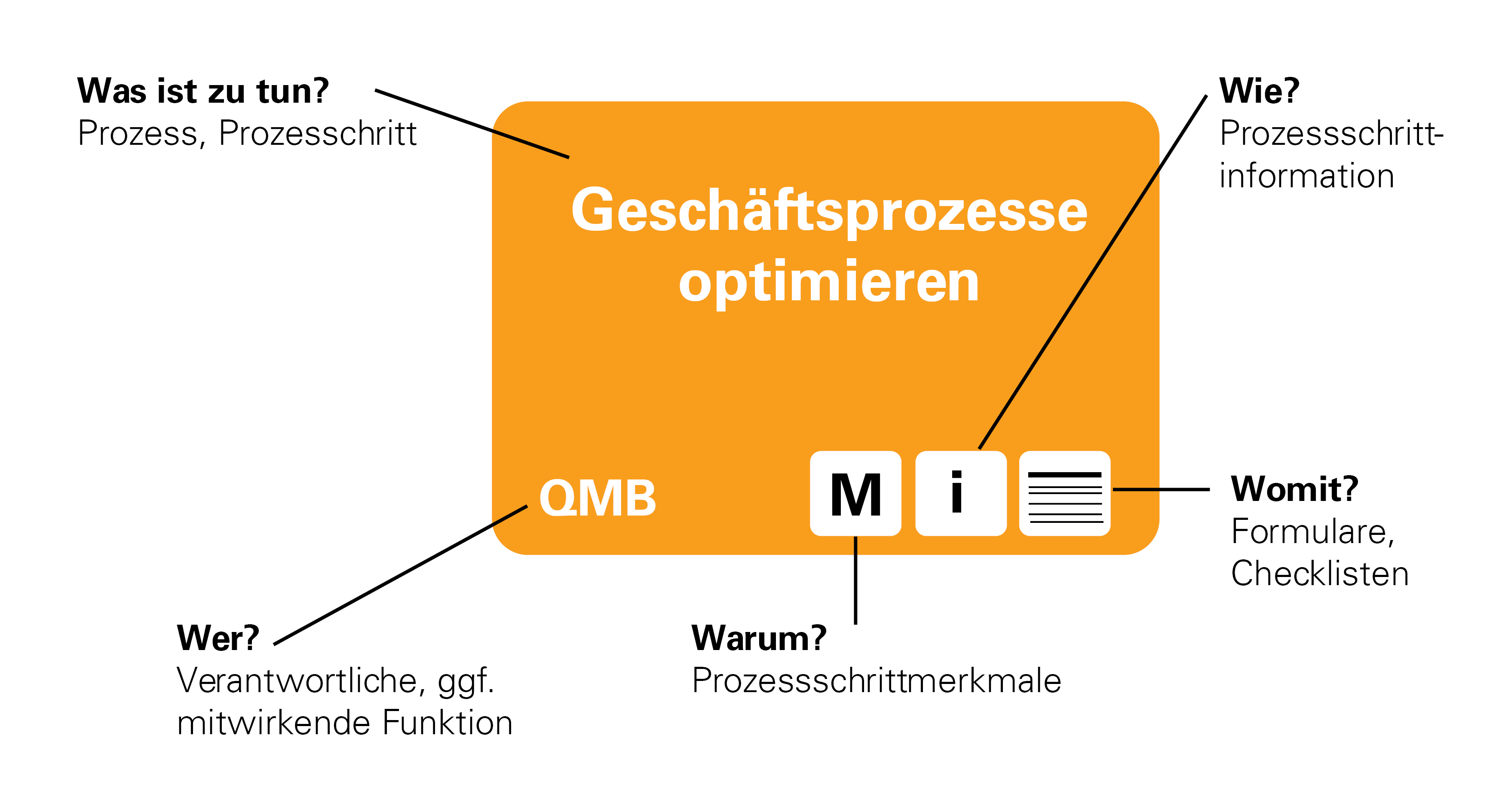 Schematische Darstellung der P-Card, der Zentralen Komponente von WissIntra